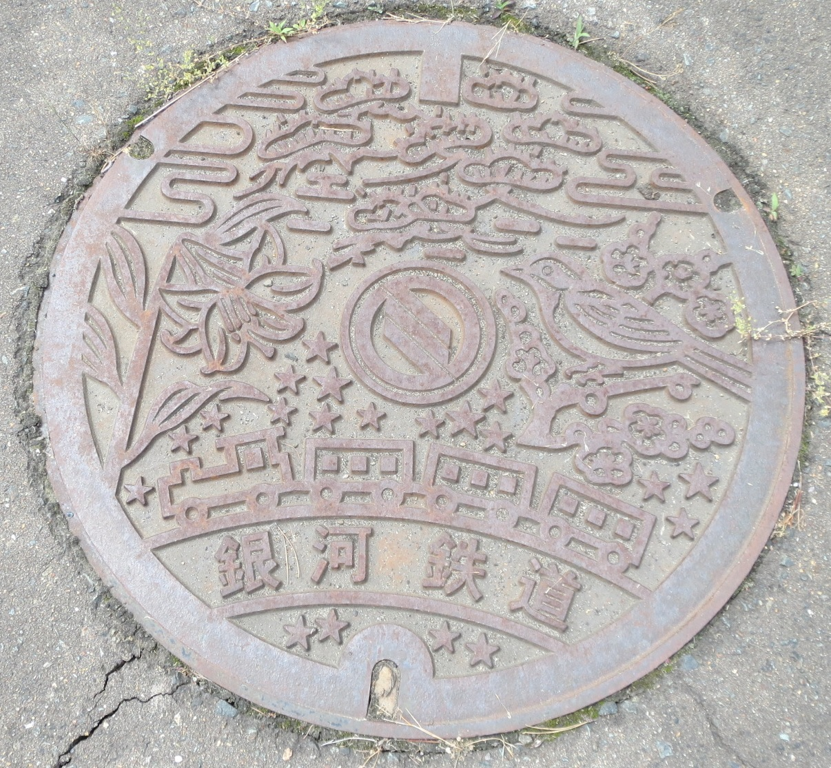 宮沢賢治が「銀河鉄道の夜」のモチーフにしたとされる釜石線宮守橋梁付近にあるマンホール。「銀河鉄道」と刻印されている。